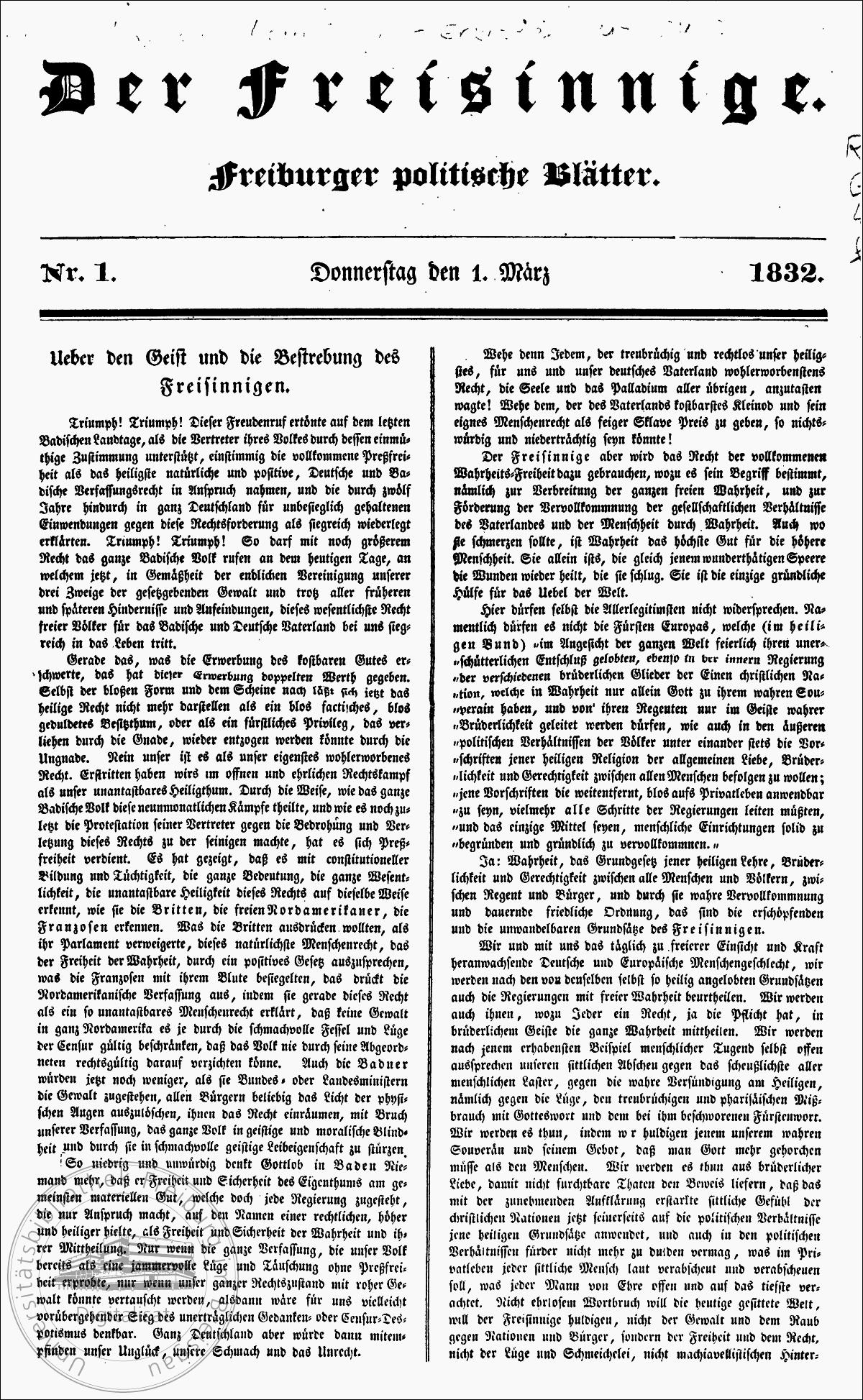 Die Zeitschrift der Freisinnige vom 1. März 1832